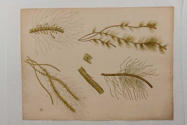 Zeichnung von Ellen Hutchins (1785-1815)